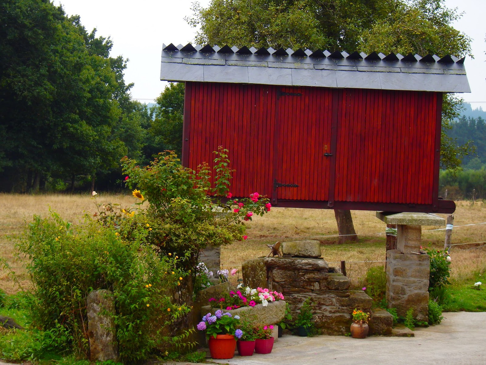 Ver título.